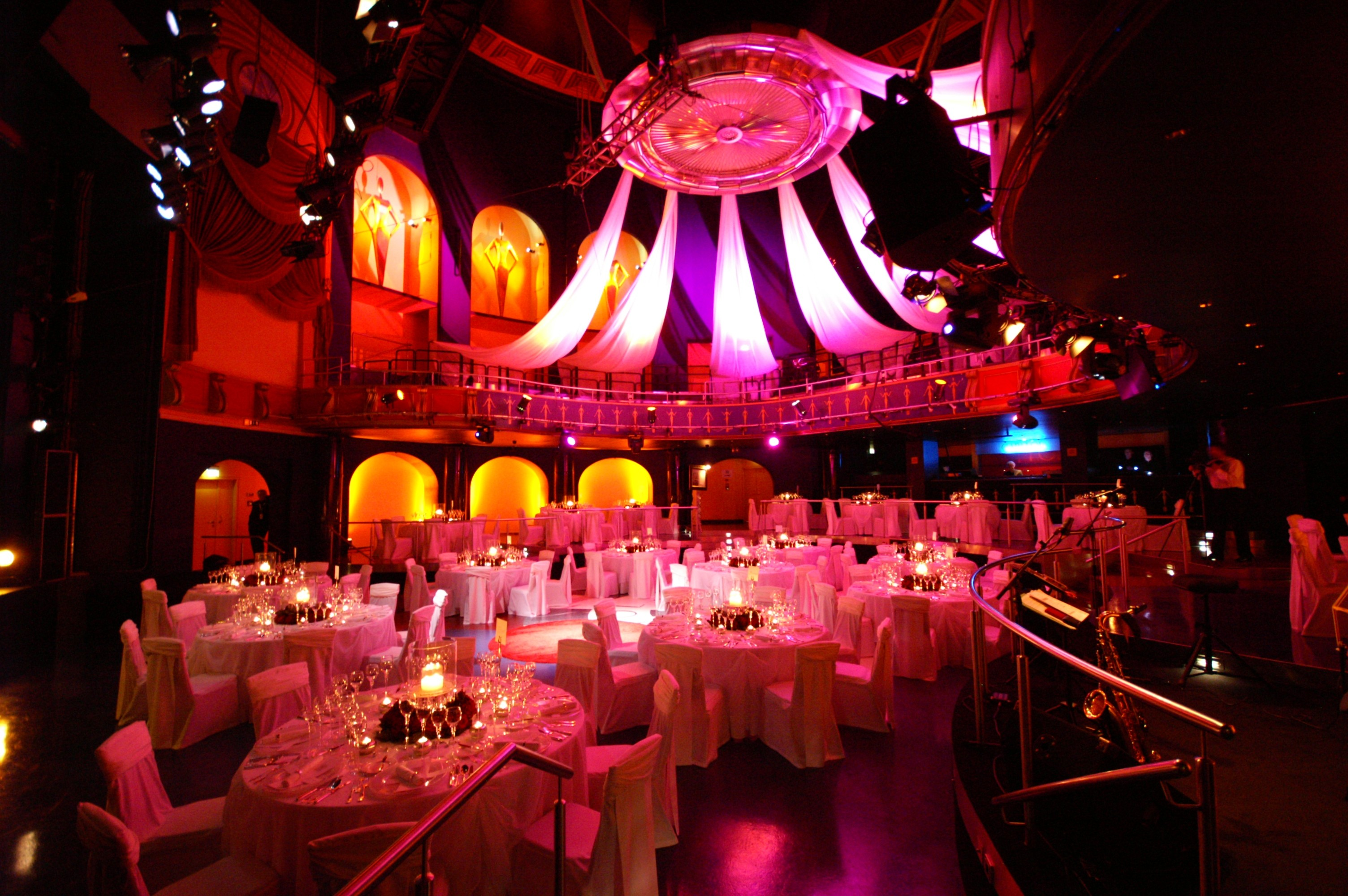 Das Capitol in Offenbach ist die ehemalige Synagoge an der Kaiserstraße und heute ein Kultur- und Veranstaltungszentrum. Insgesamt bietet es bis zu 1800 Gästen Platz. Es ist in drei Säle unterteilt und es existiert weiterhin eine Theaterbühne. Seit 2005 ist die Neue Philharmonie Frankfurt hier untergebracht.